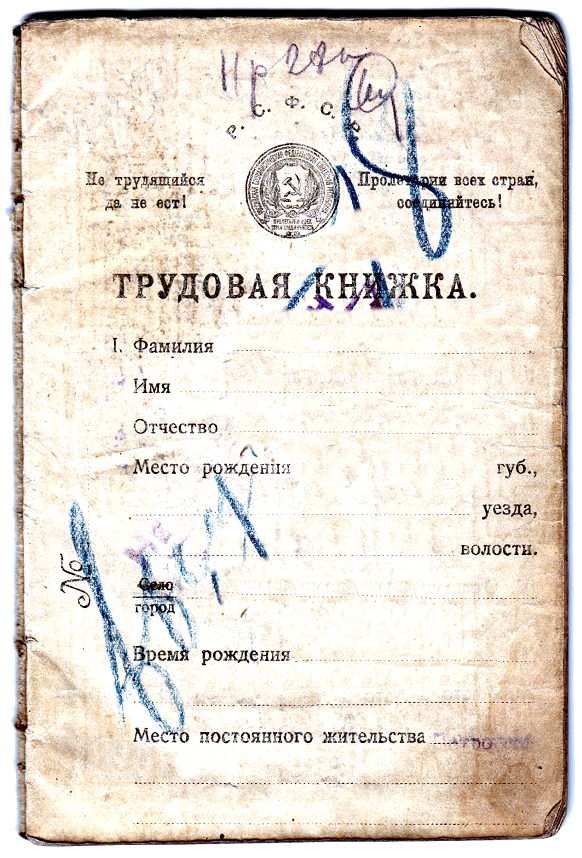 Трудовая книжка. 32 страницы. 1921 год.